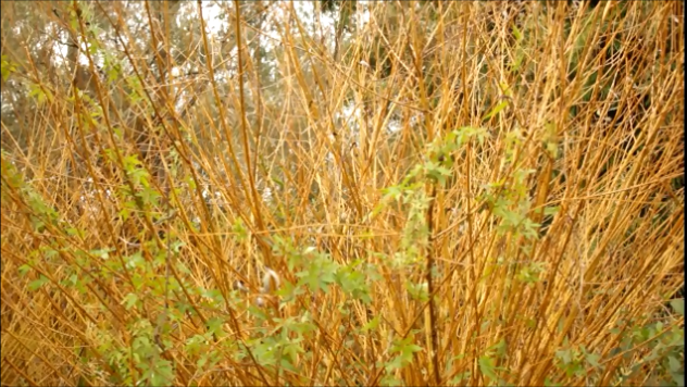 Imagen de una planta de Mimbre Amarillo , plantada por los ribereños de la costa de Villa Dominico , Avellaneda.La fotografía está tomada en la costa del Rió de la Plata a la altura de Villa Domínico,Avellaneda se observa un arbusto de mimbre amarillo de muchas ramas largas, las mismas son delgadas y flexibles.En la actualidad,se pueden divisar cientos de ejemplares en la región.En el siglo XX fue utilizado para la elaboración de canastas y para proteger las damajuanas habiendo sido la cestería una actividad económica muy importante que incluía ademas confección de cajones y cestos.